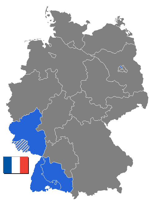 Manche Bundesländer sind erst 1946 gebildet worden. 1946 aber auch das Saarland aus der fr.BZ rausgenommen.